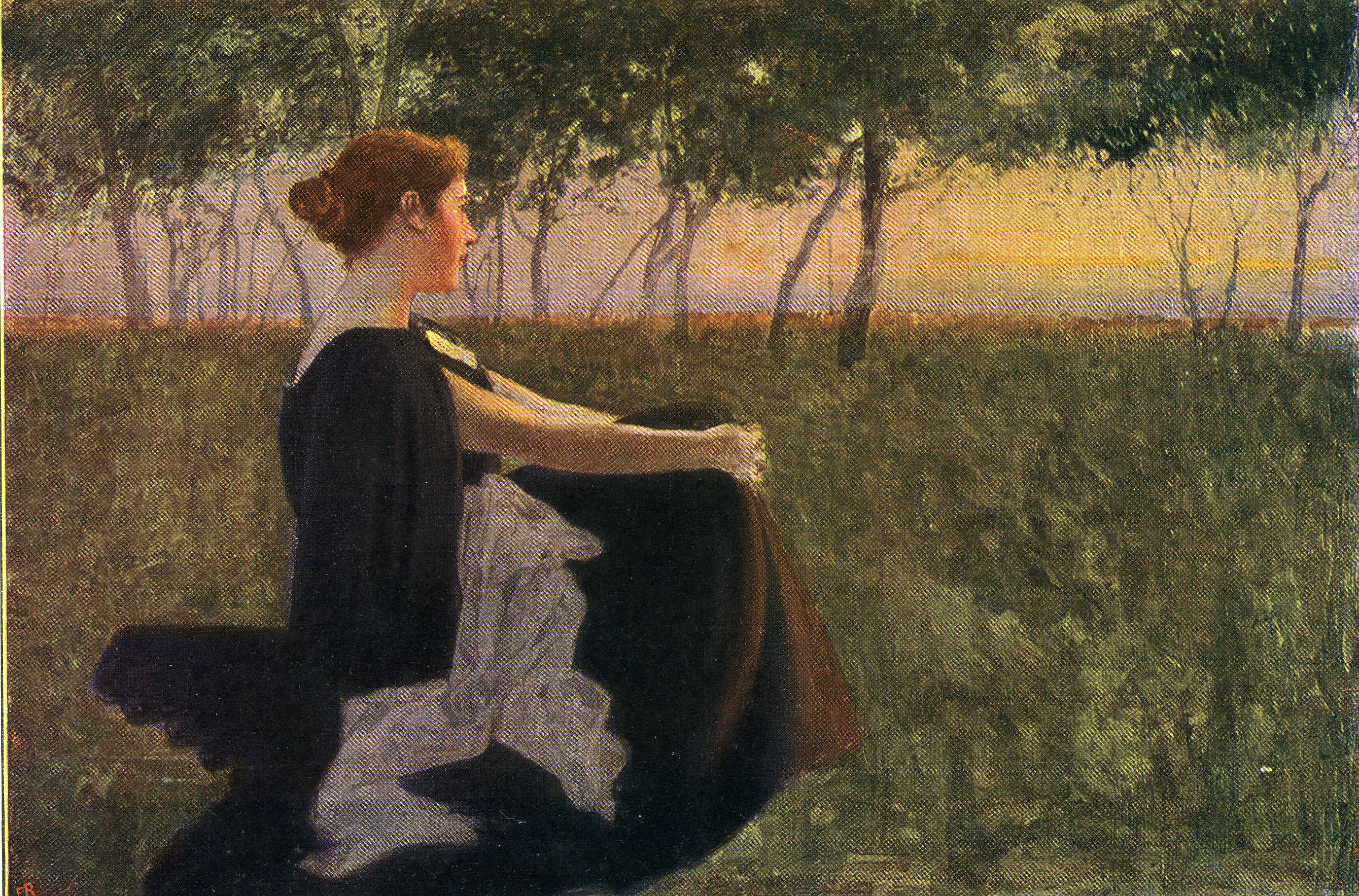 Abend